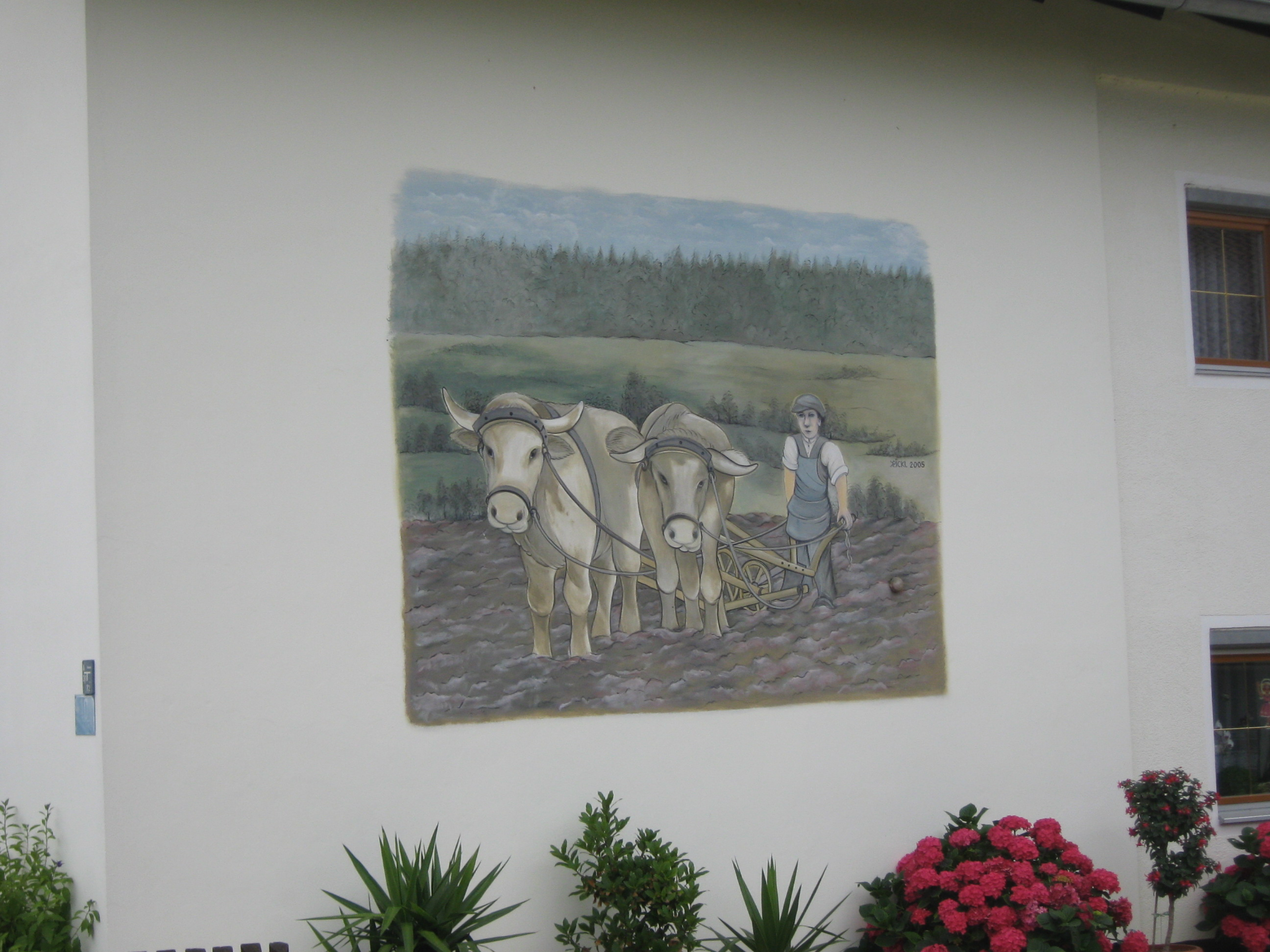 Wandgemälde auf Haus-Nr. 10, Ödhäusl, Dingolfing, Niederbayern